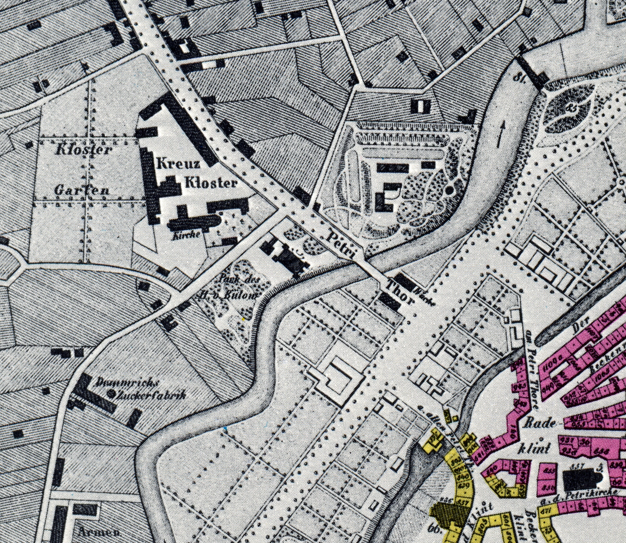 Plan von Braunschweig mit seinen nächsten Umgebungen Nordöstlicher Ausschnitt.